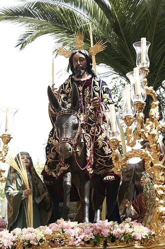 Sagrada Entrada en Jerusalén. Semana Santa en Sevilla. Año 2006 Foto realizada y propiedad de Ángel Chacón